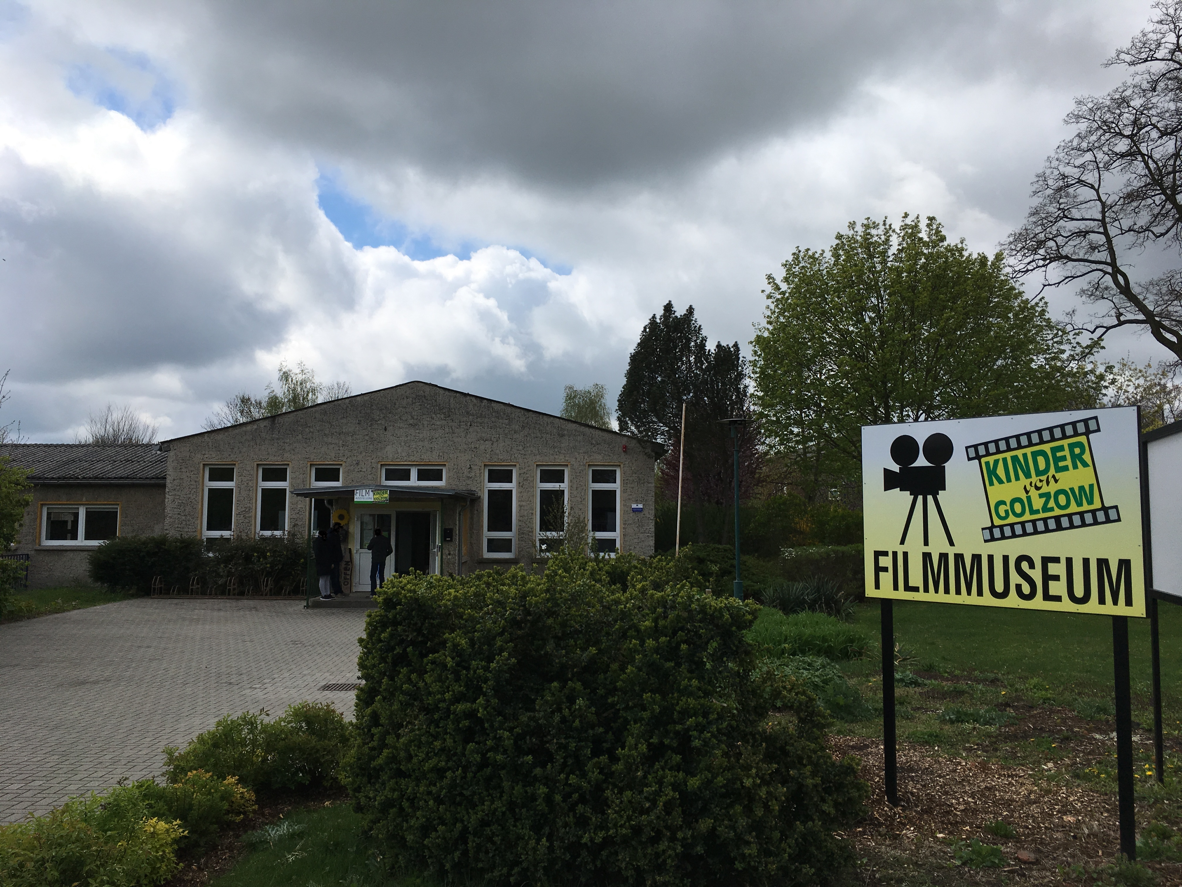 Filmmuseum für die Dokumentation "Die Kinder von Golzow" in Golzow, einer Gemeinde im Landkreis Märkisch-Oderland in Brandenburg.